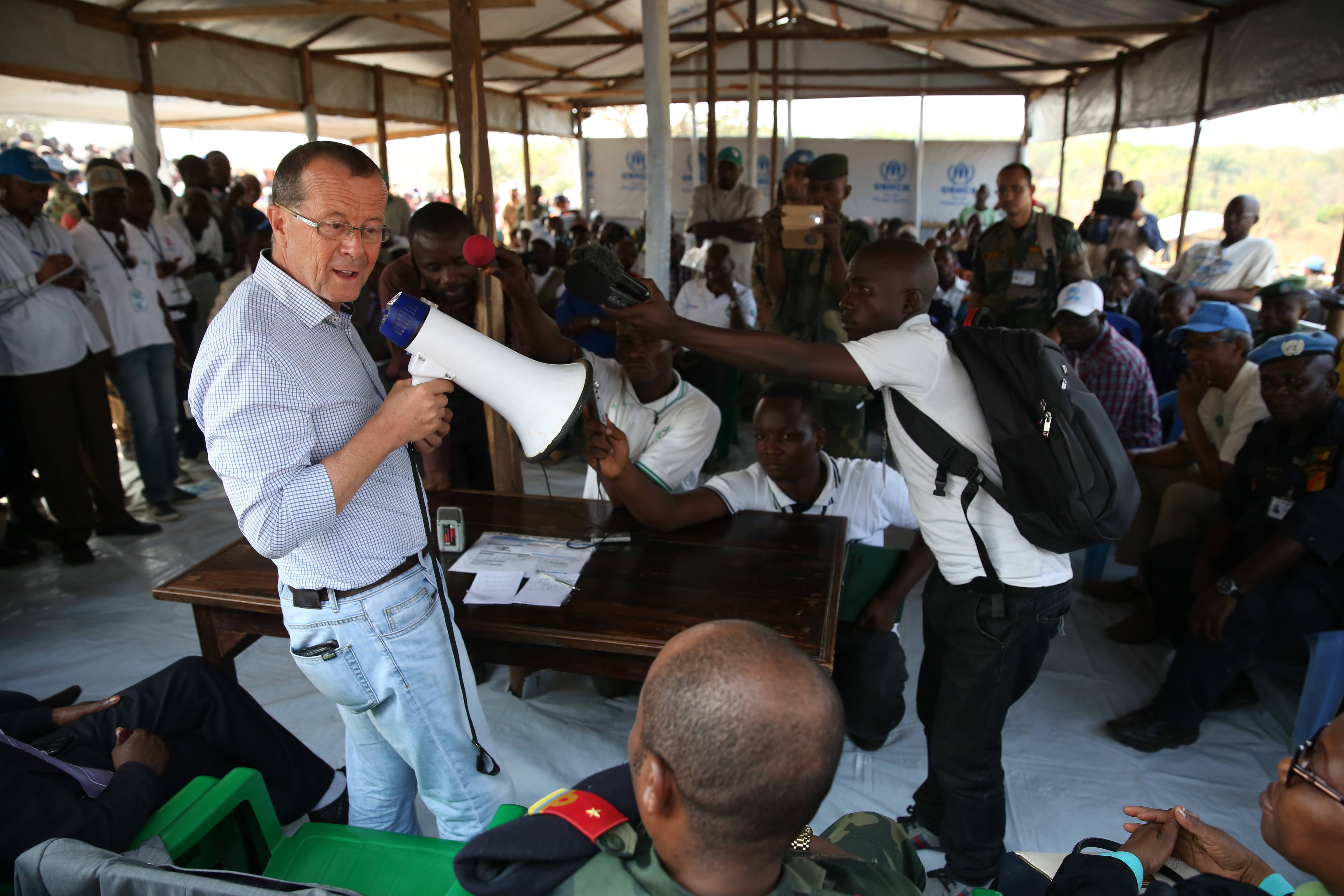 Photo MONUSCO / Abel Kavanagh